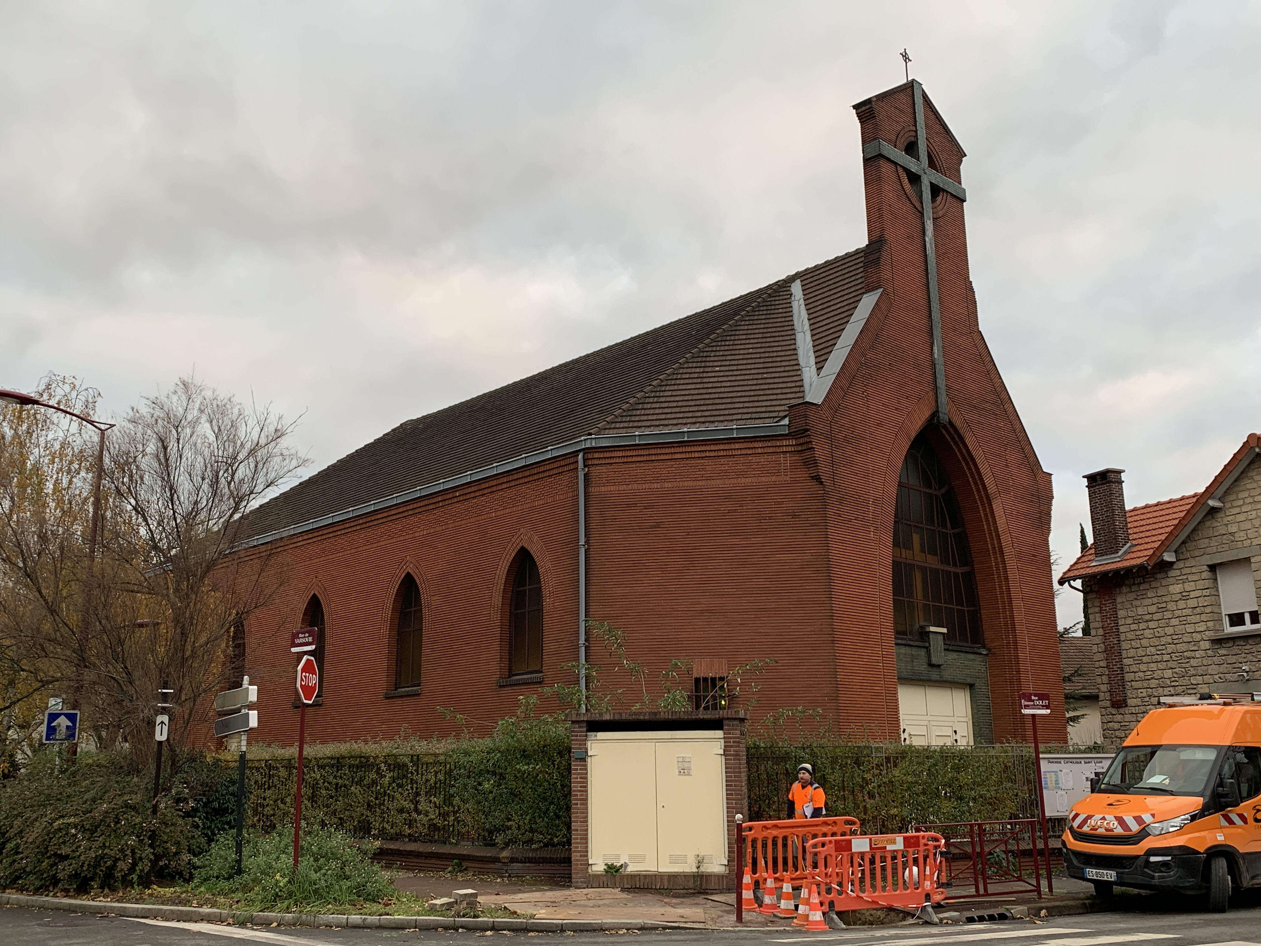 Église Saint-Louis de Bondy.